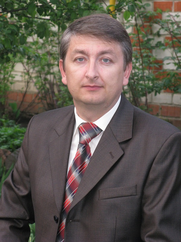 Замулин В. Н., военный историк.